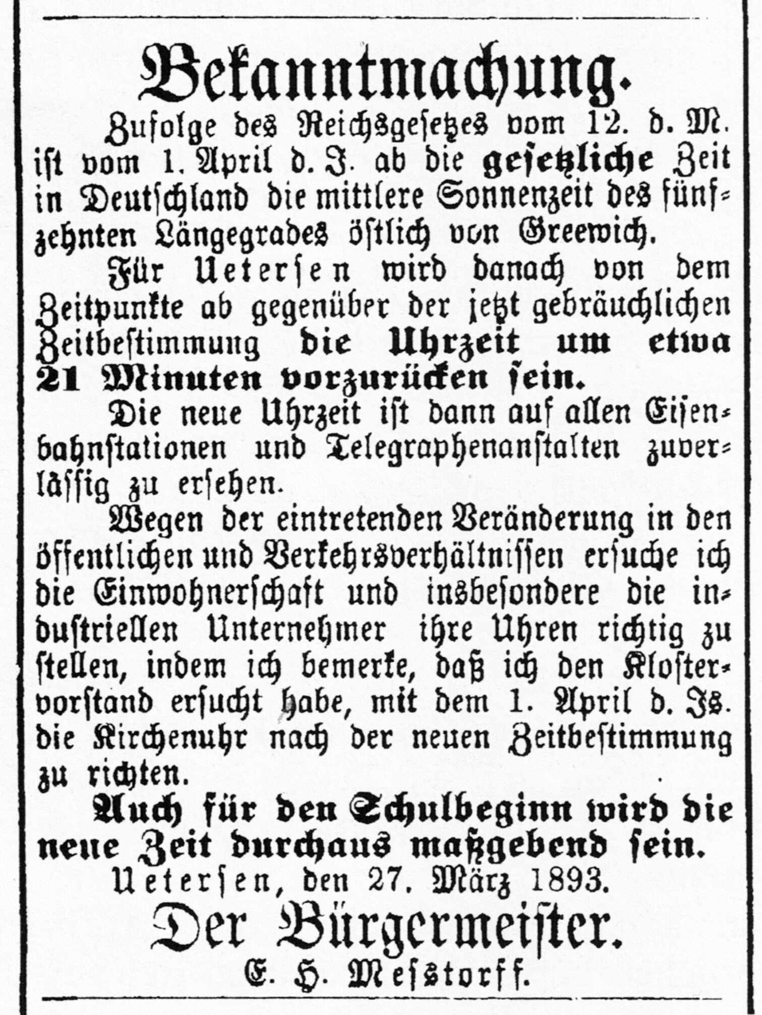 Zeitungsanzeige für die Umstellung der Sonnenzeit vom 27. März 1893